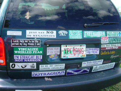 Bumper stickers